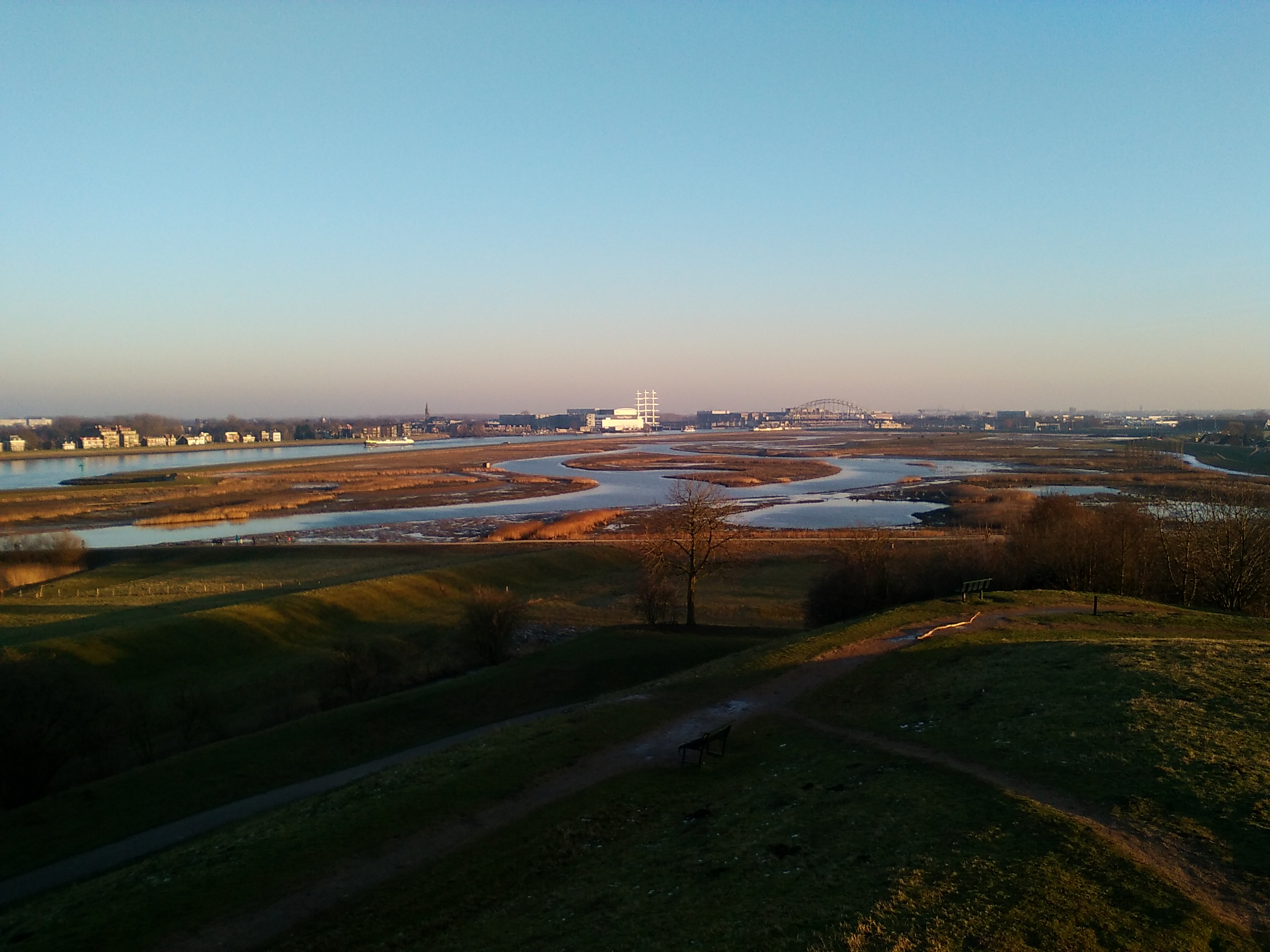 De Crezeépolder was een voormalig waterwinningsgebied, tot 20 januari 2017, toen het officieel werd geopend als een natuurgebied.